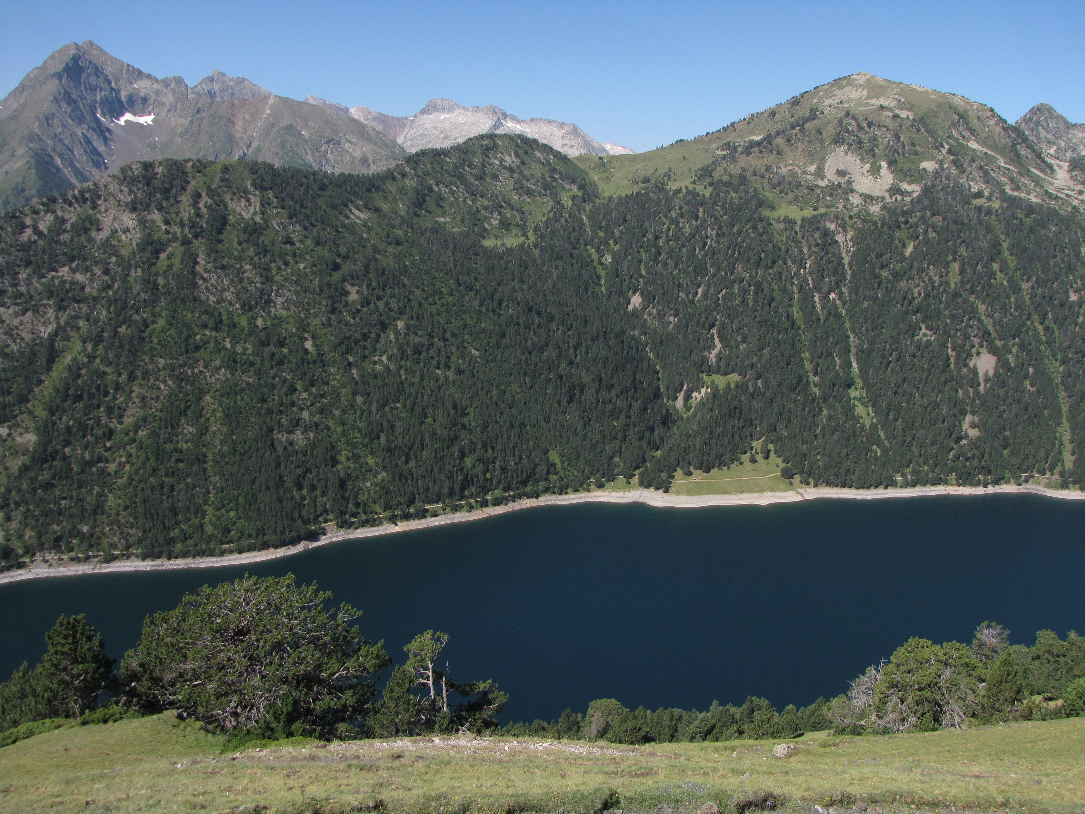 Lac de l'Oule